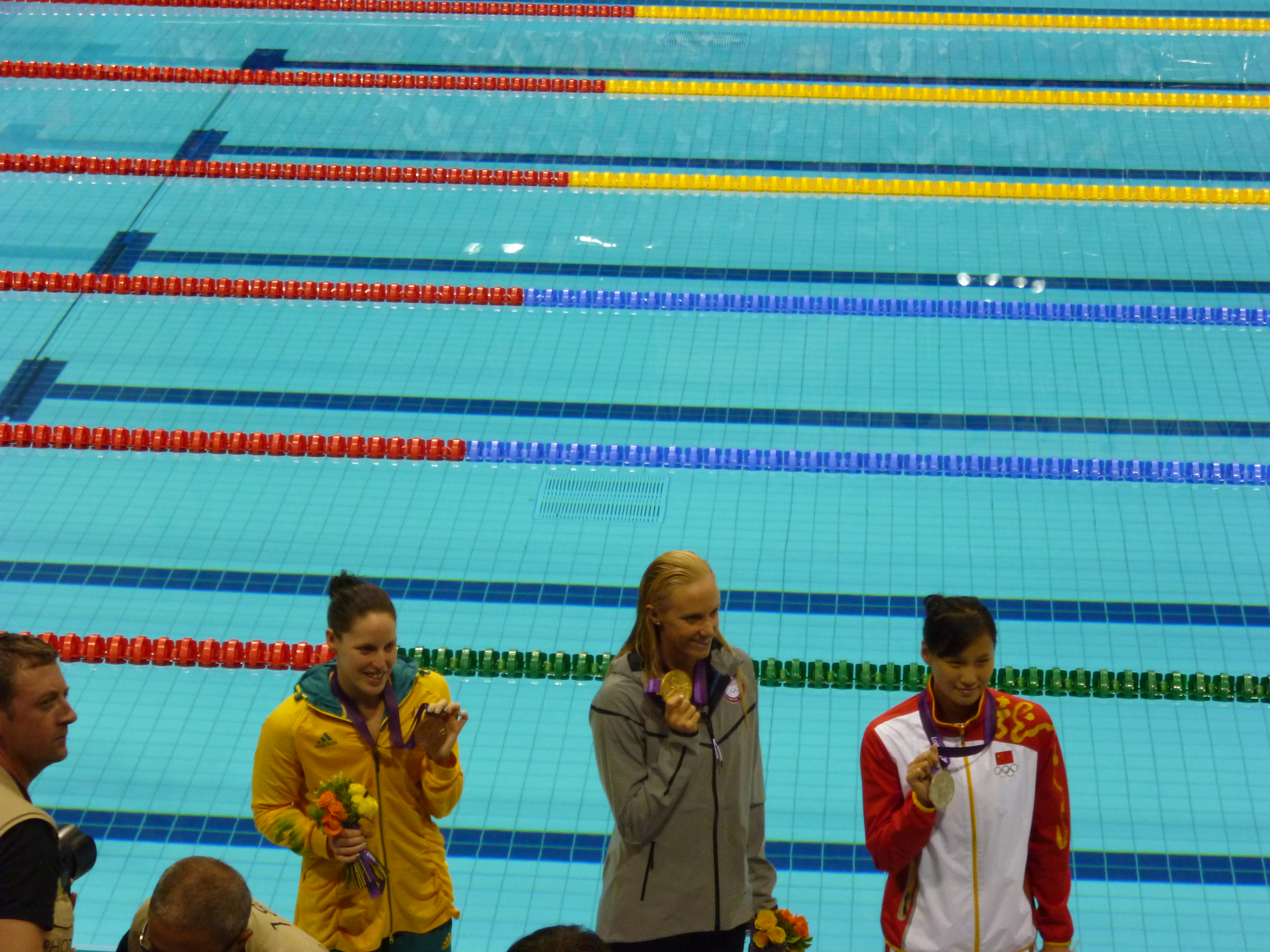 Dana Vollmer, Lu Yings y Alicia Coutts